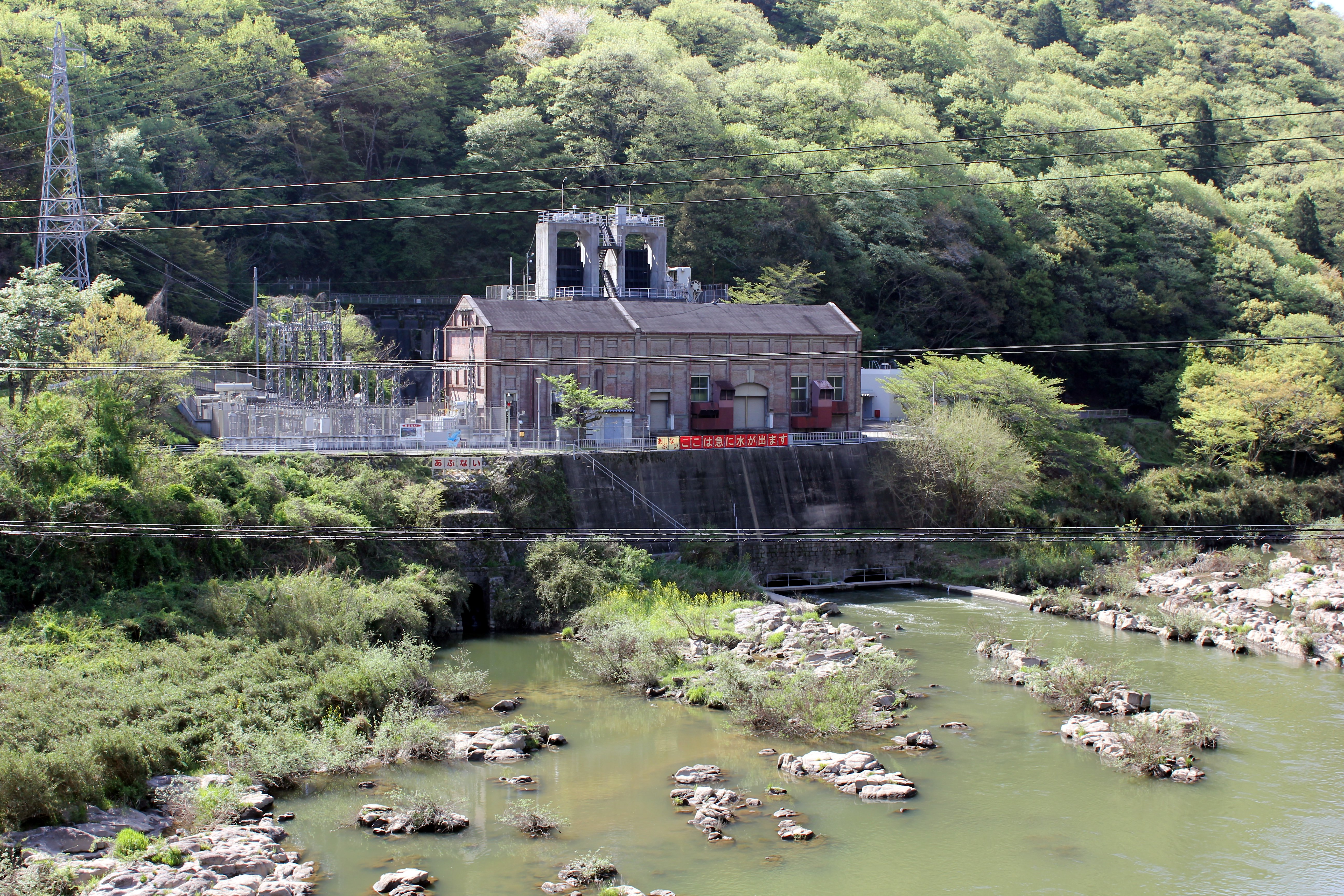 大河原発電所（京都府・木津川。関西電力株式会社管理）